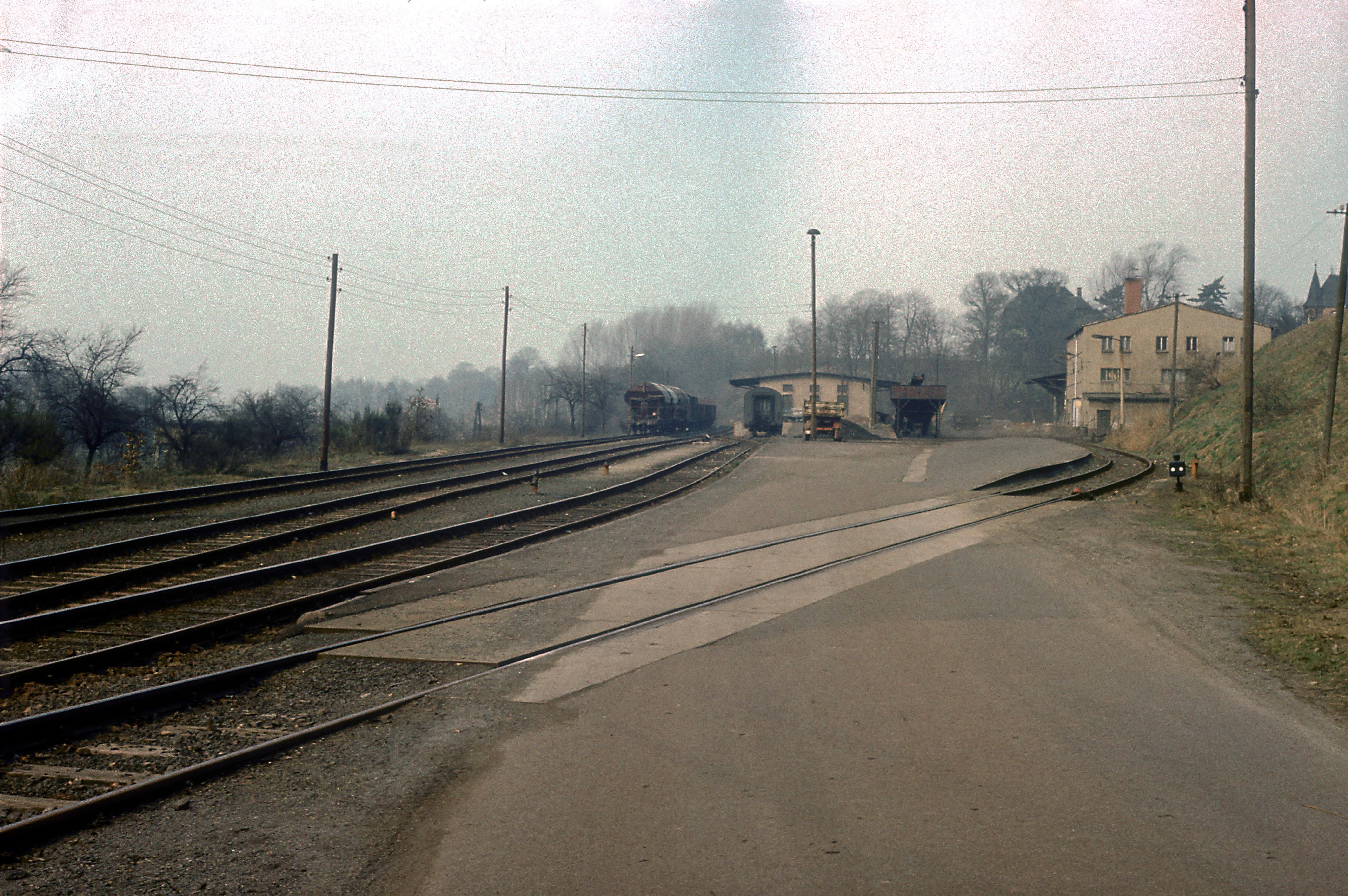 Fünfzehn Jahre nach der Einstellung des Reiseverkehrs sind die Gleisanlagen noch vollständig erhalten.Nach 2000 wurden sie abgebaut, heute verläuft hier der Muldentalbahnradweg.